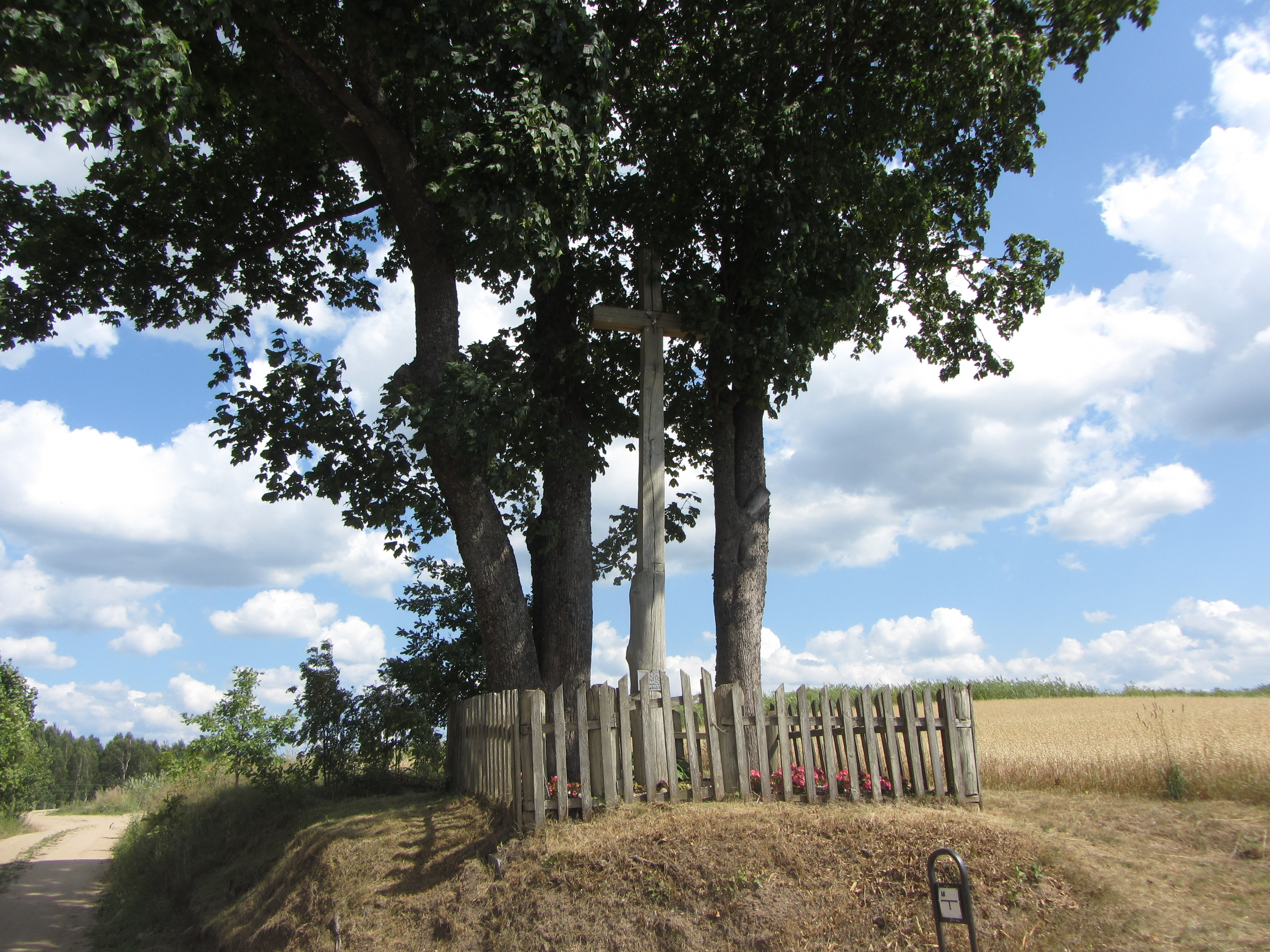 Modžiūnai, Lithuania